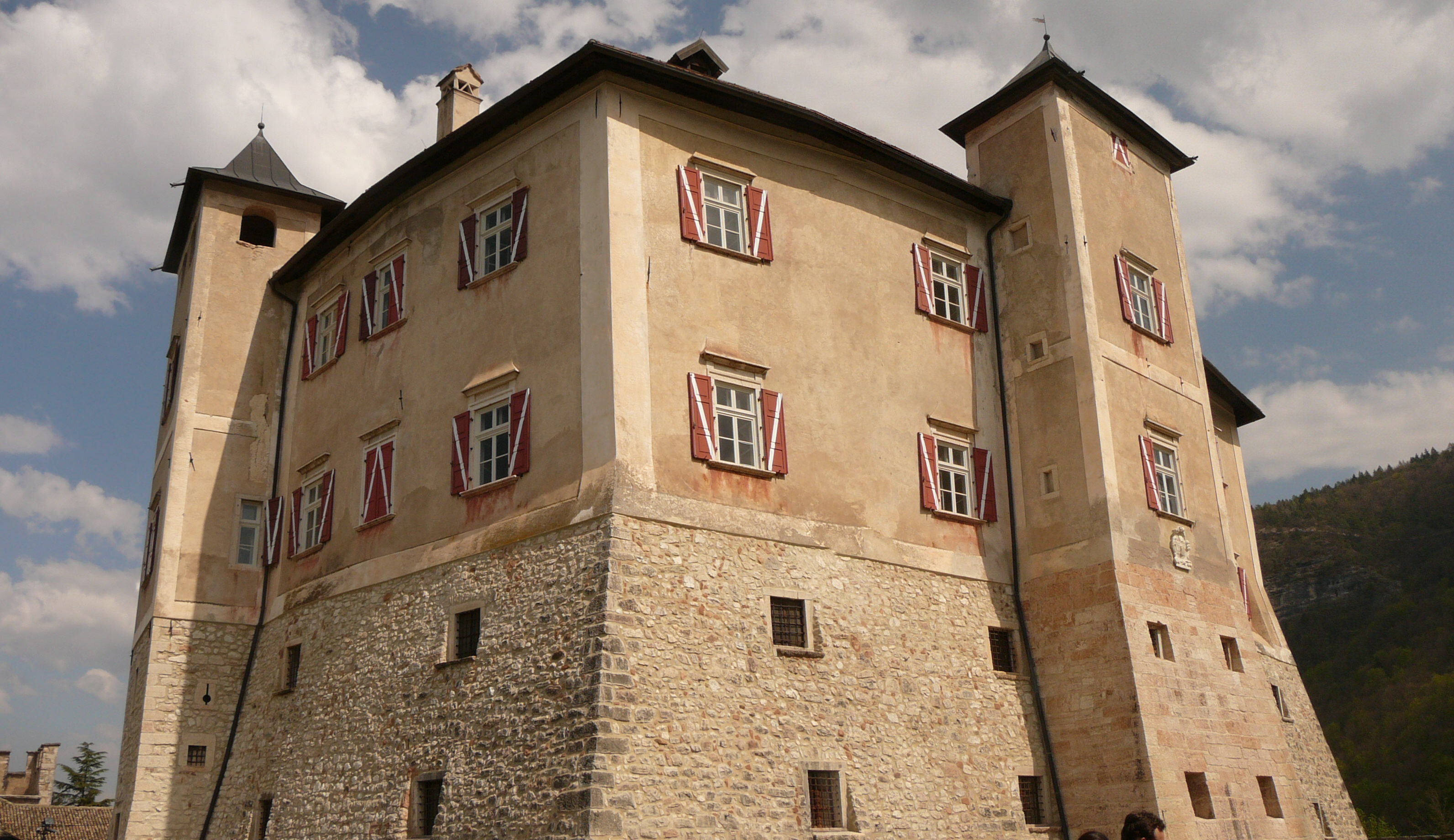 Angolo del Castel Thun